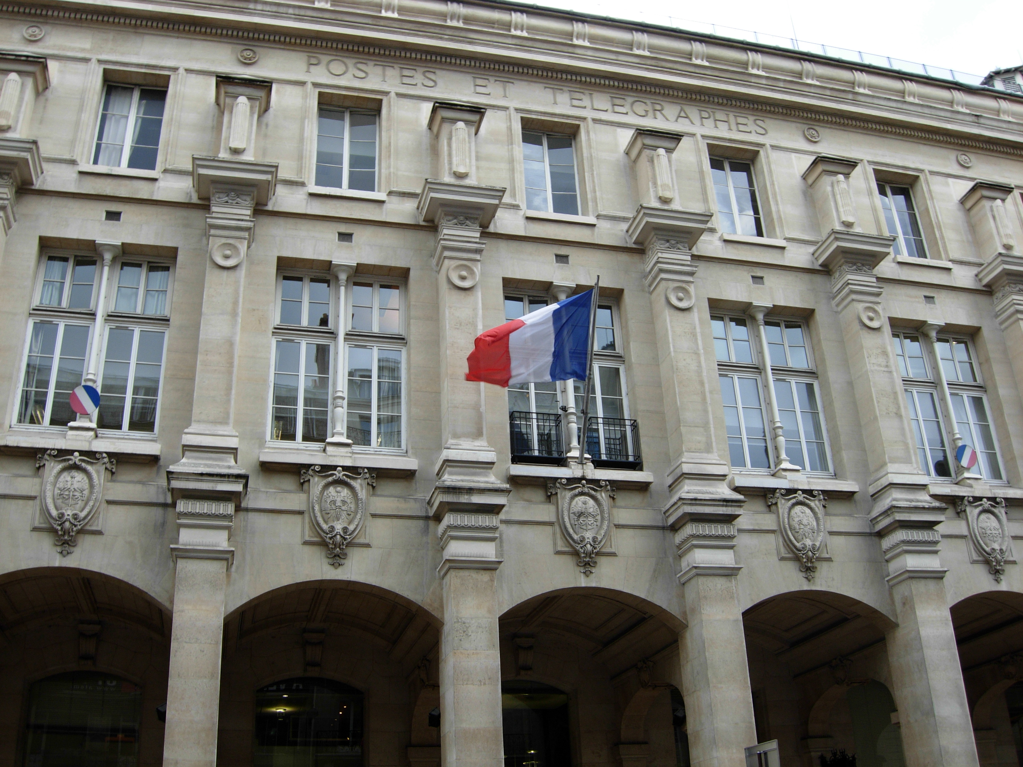 Inscription Postes et Télégraphes sur la façade du bureau de poste Paris Louvre (Paris, Ier arrondissement) Accès: 52, rue du Louvre, Paris 75001 Métro: Les Halles ou Etienne Marcel (lignes 1, 4, 7 ou 11)